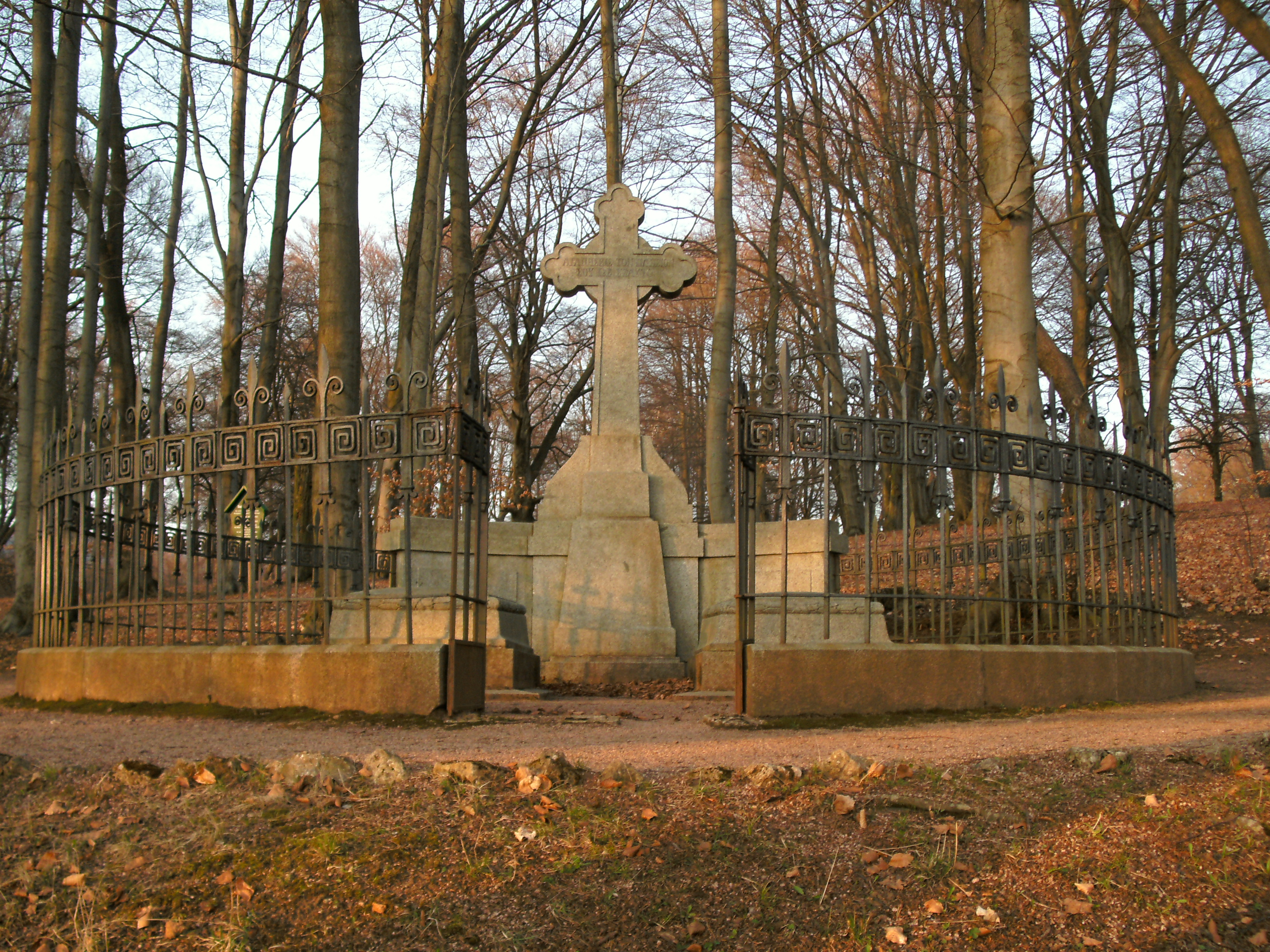 Grab des Herzogs Bernhard III. im Altensteiner Park